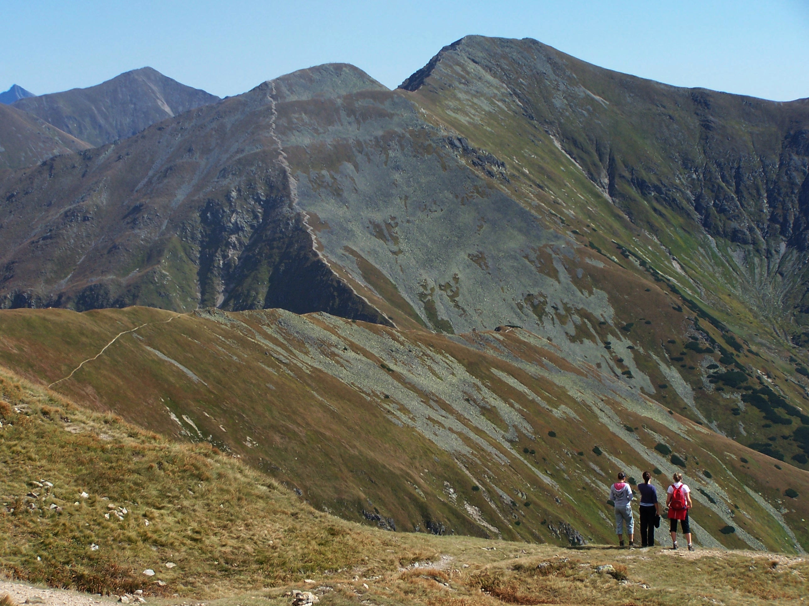 Jakubina (Raczkowa Czuba) - West Tatra Mountains